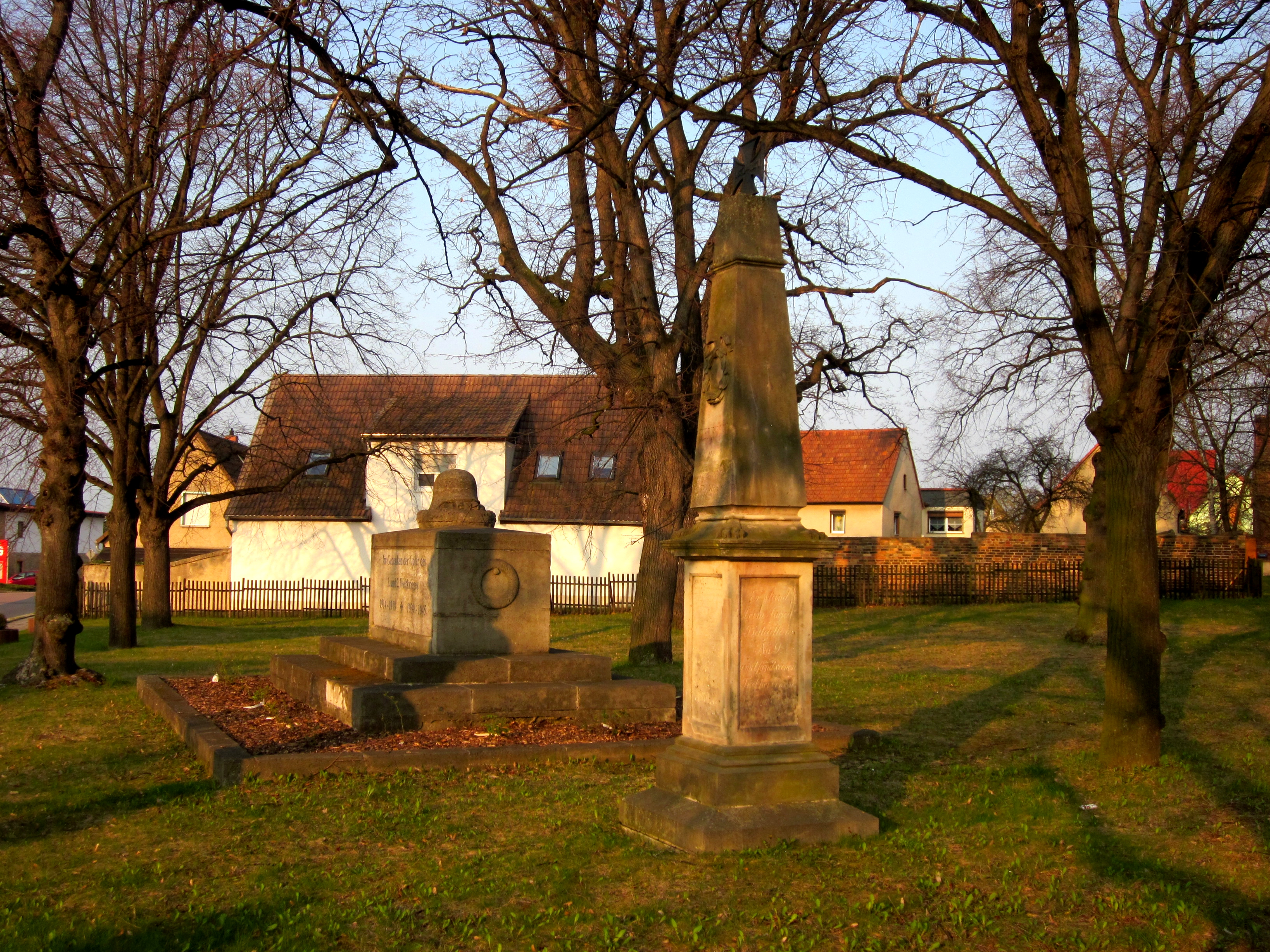 Kriegerdenkmäler in Obhausen